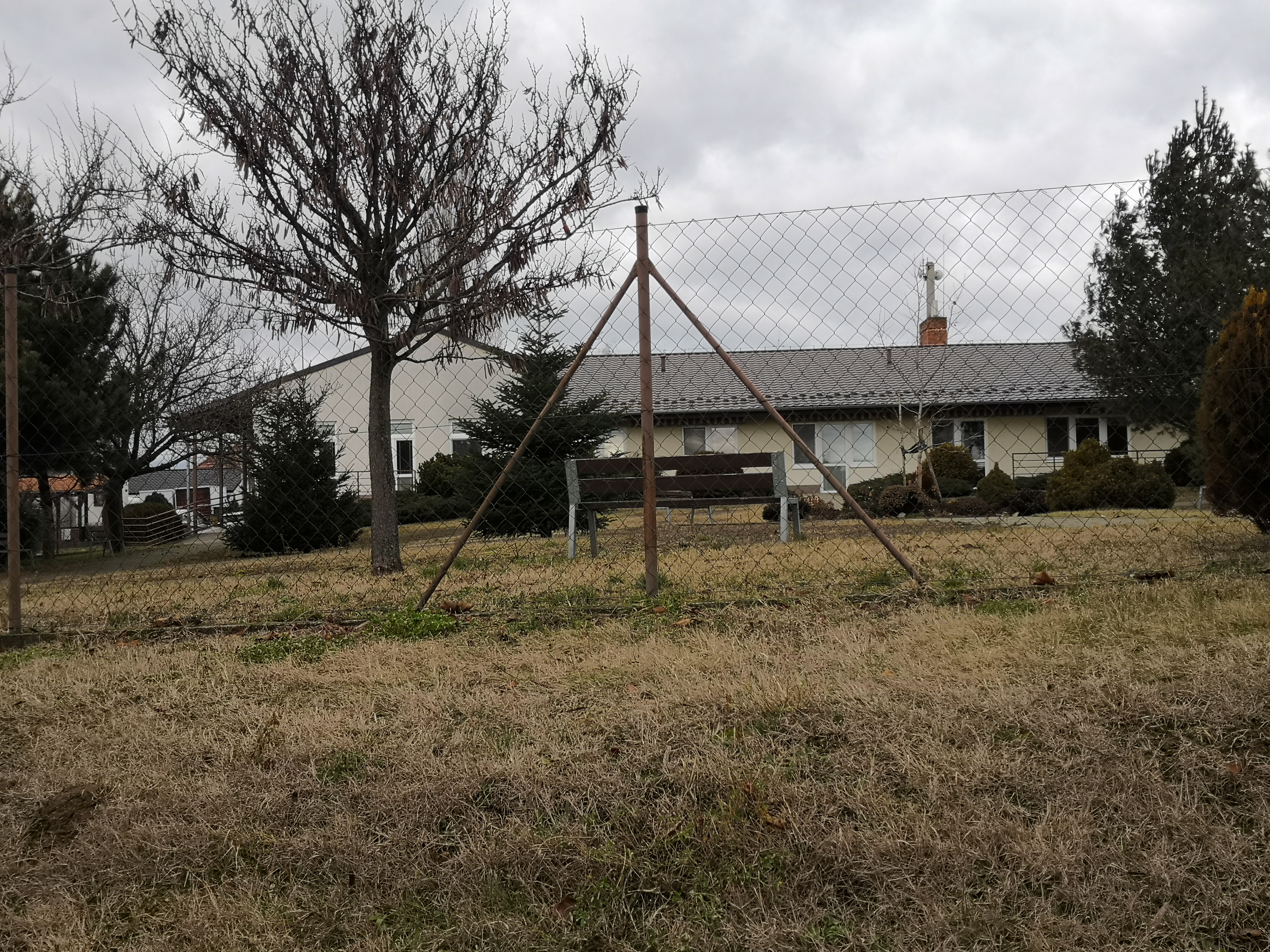 Domov dôchodcov v Pate, fotené z Dlhej ulice, v popredí dvor